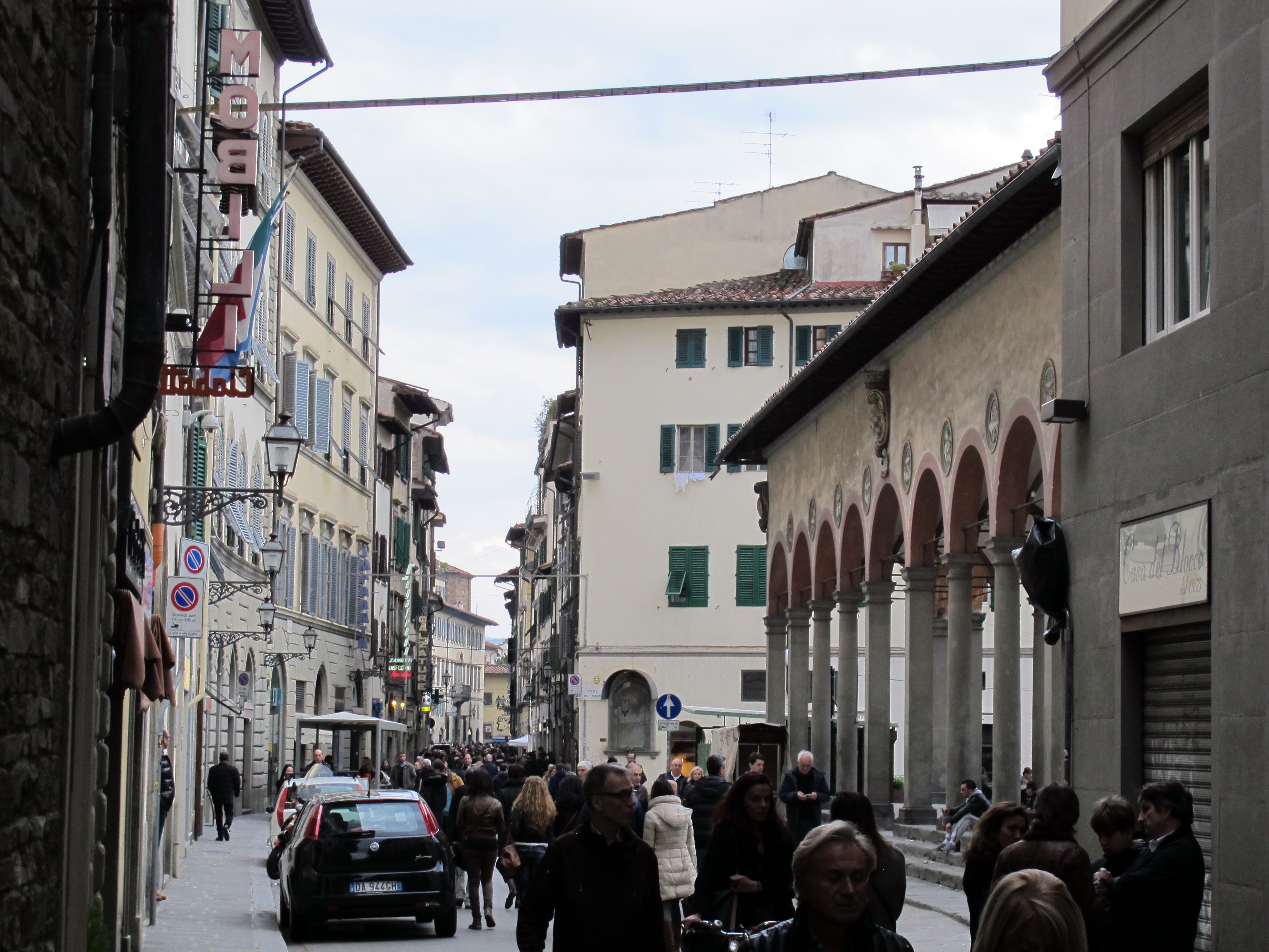 Via pietrapiana veduta